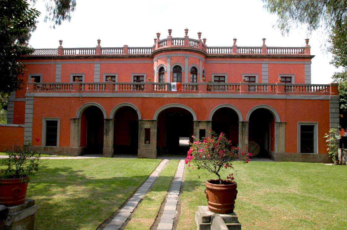 Exhacienda de Enmedio, parte del complejo de la Capilla de Santa Mónica, Tlalnepantla, Estado de México